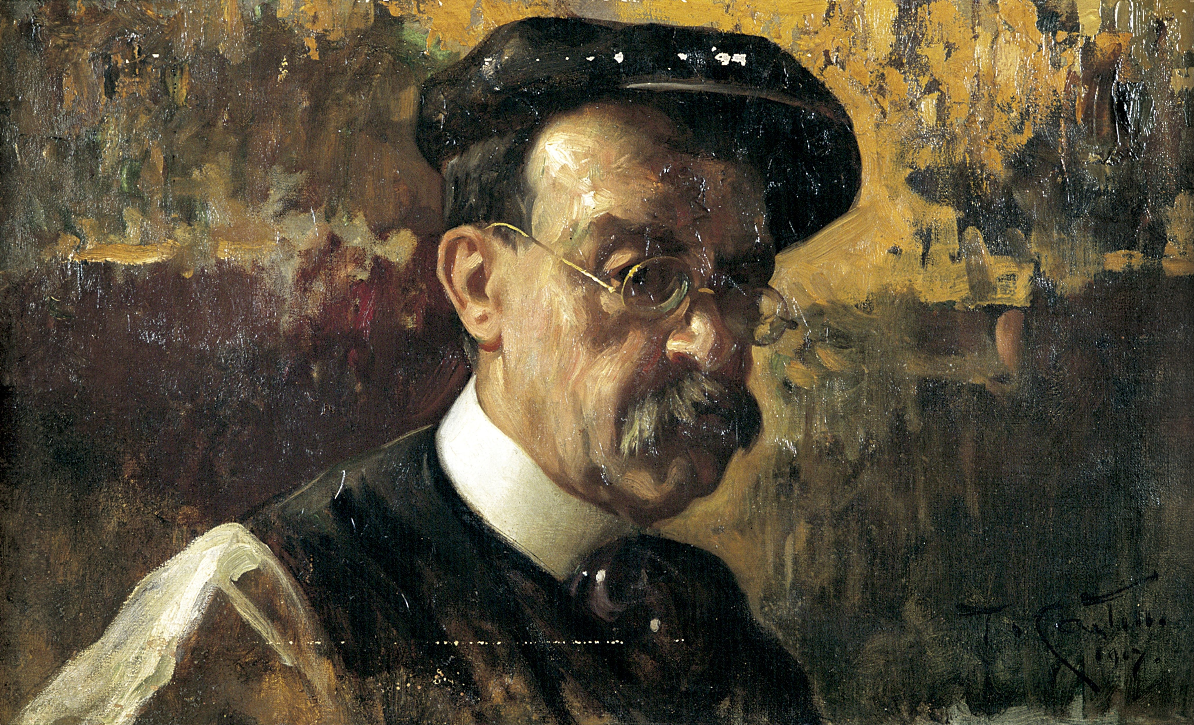 Teófilo Castillo Guas (1857 – 1922) pintor, crítico de arte y fotógrafo peruano.